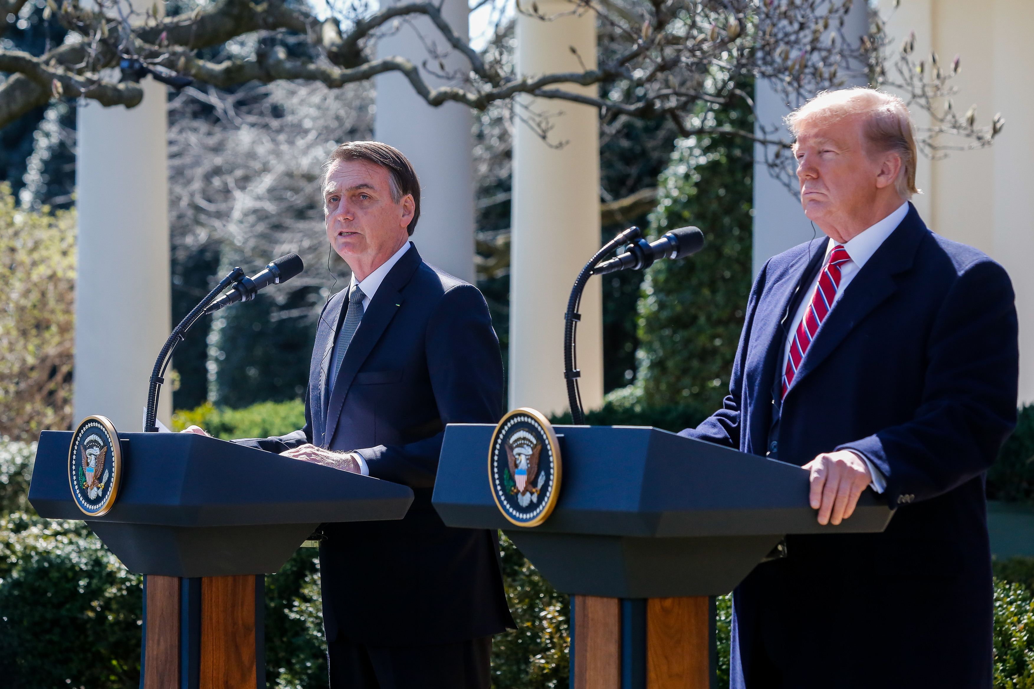 (Washington, DC - EUA 19/03/2019) Presidente da República Jair Bolsonaro responde perguntas da imprensa durante o encontro.